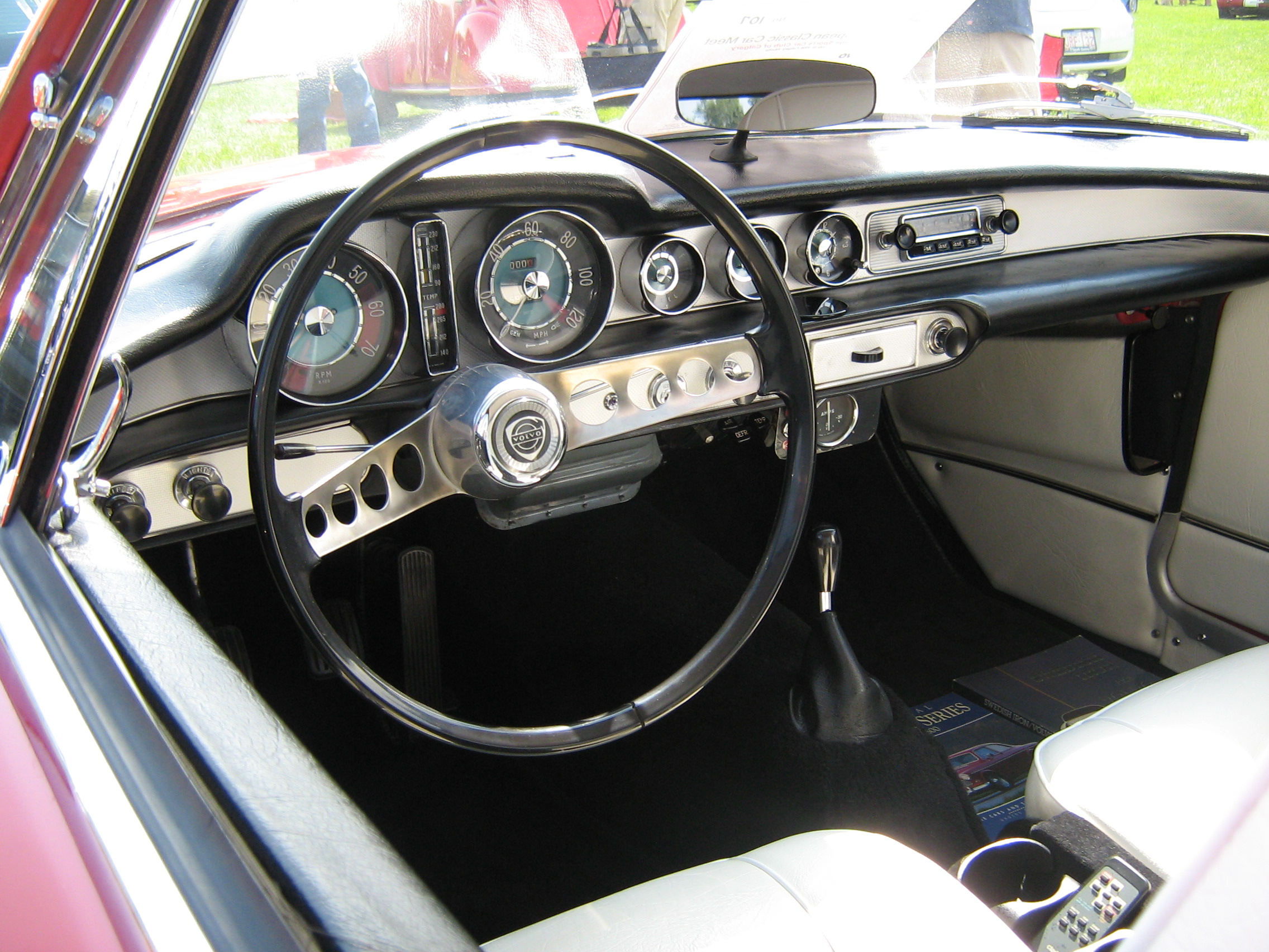 1966 Volvo P1800